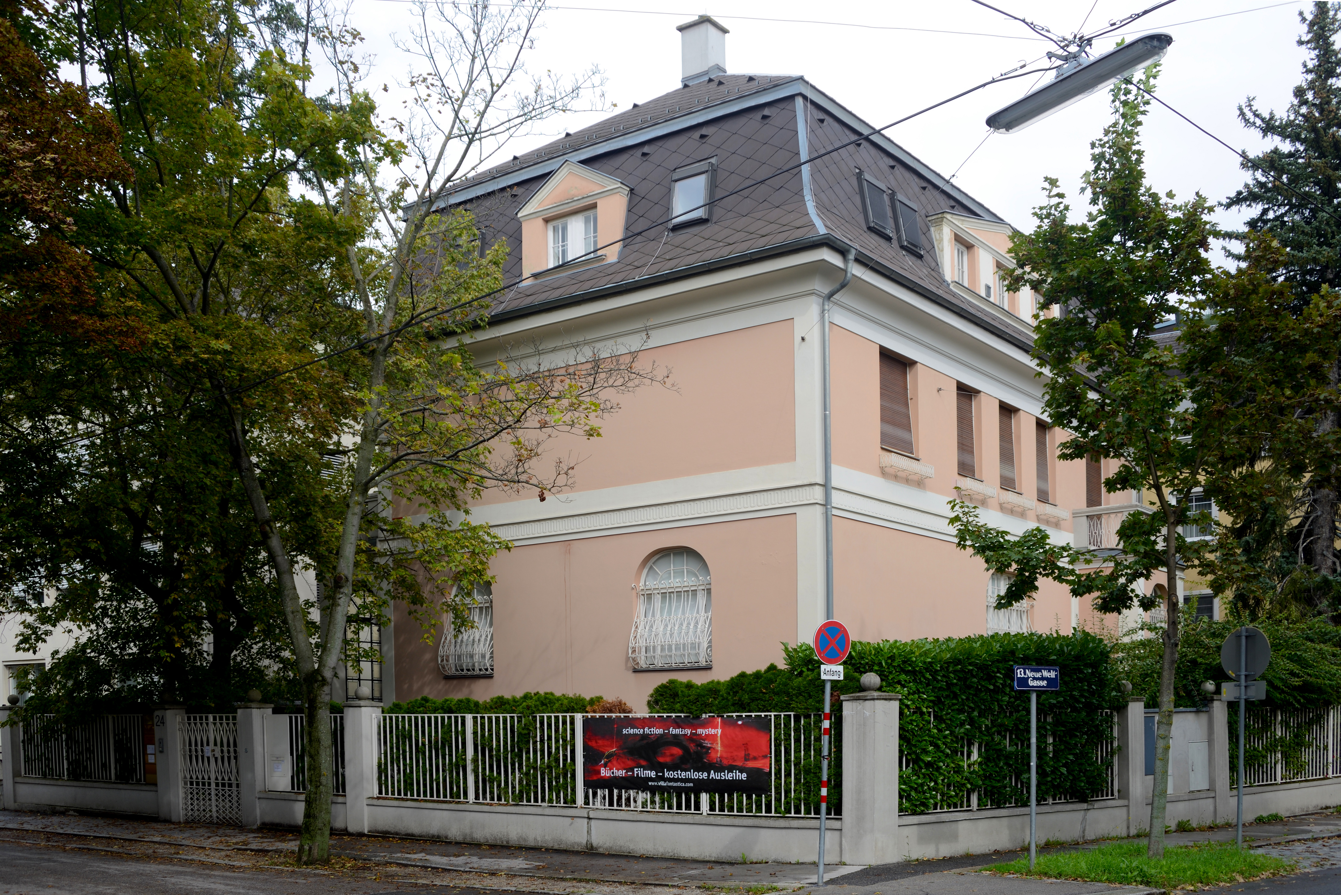 Villa Fantastica in Hietzing